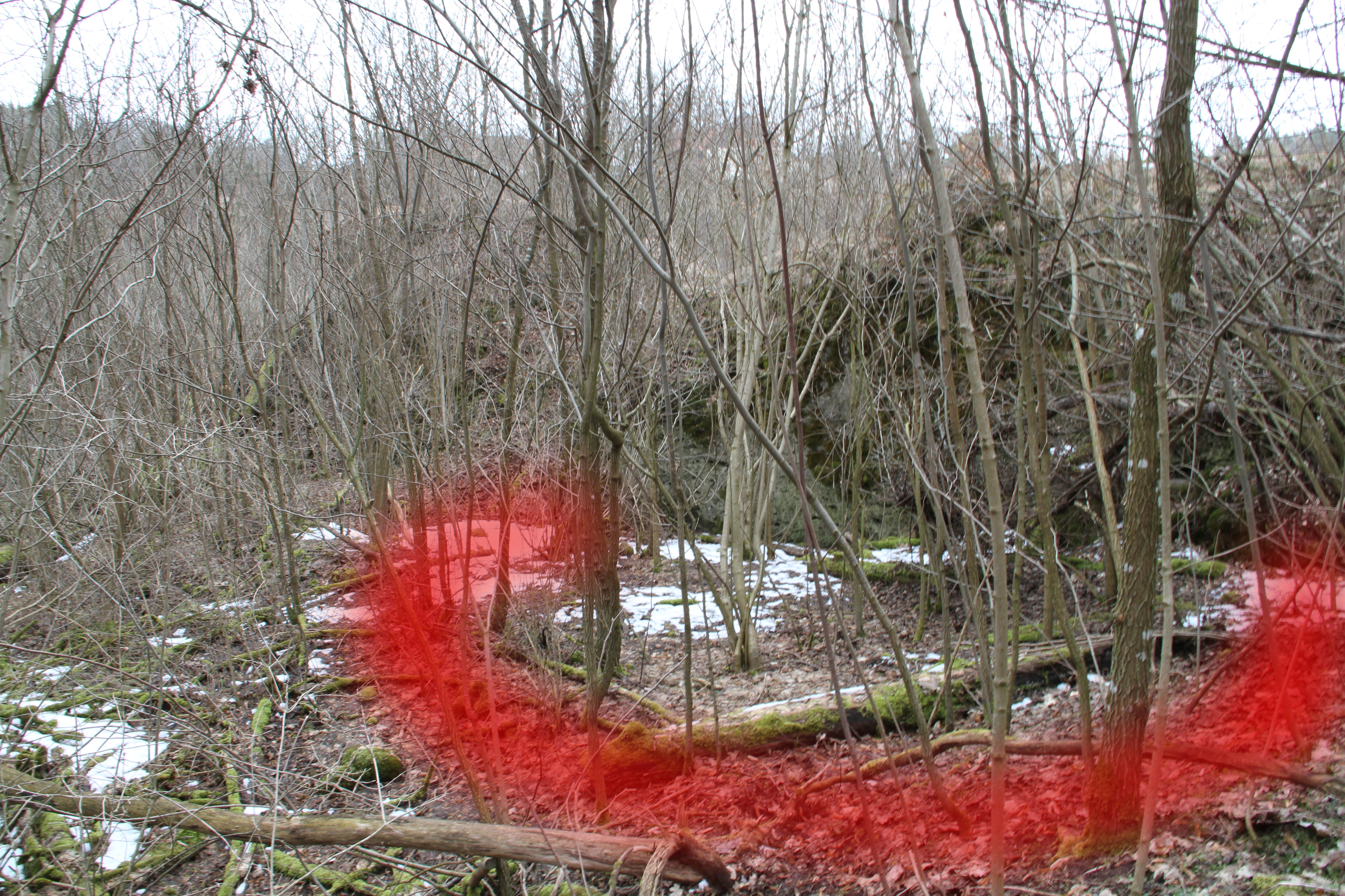 Blick auf den Burgstall Kleinziegenfeld. Bearbeitungsspuren an den beiden zu sehenden überwucherten Felsen deuten darauf hin, dass sie Teil von Gebäuden oder Mauern waren. Der rot gefärbte Halbkreis kennzeichnet eine vor Ort deutlich erkennbare kreisförmige Erhebung im Boden. Vermutlich handelt es sich dabei um die überwucherten Fundamentreste eines Turms, evtl. des Bergfrieds. Der Fels hinter dem Halbkreis war wahrscheinlich Teil dieses Turms